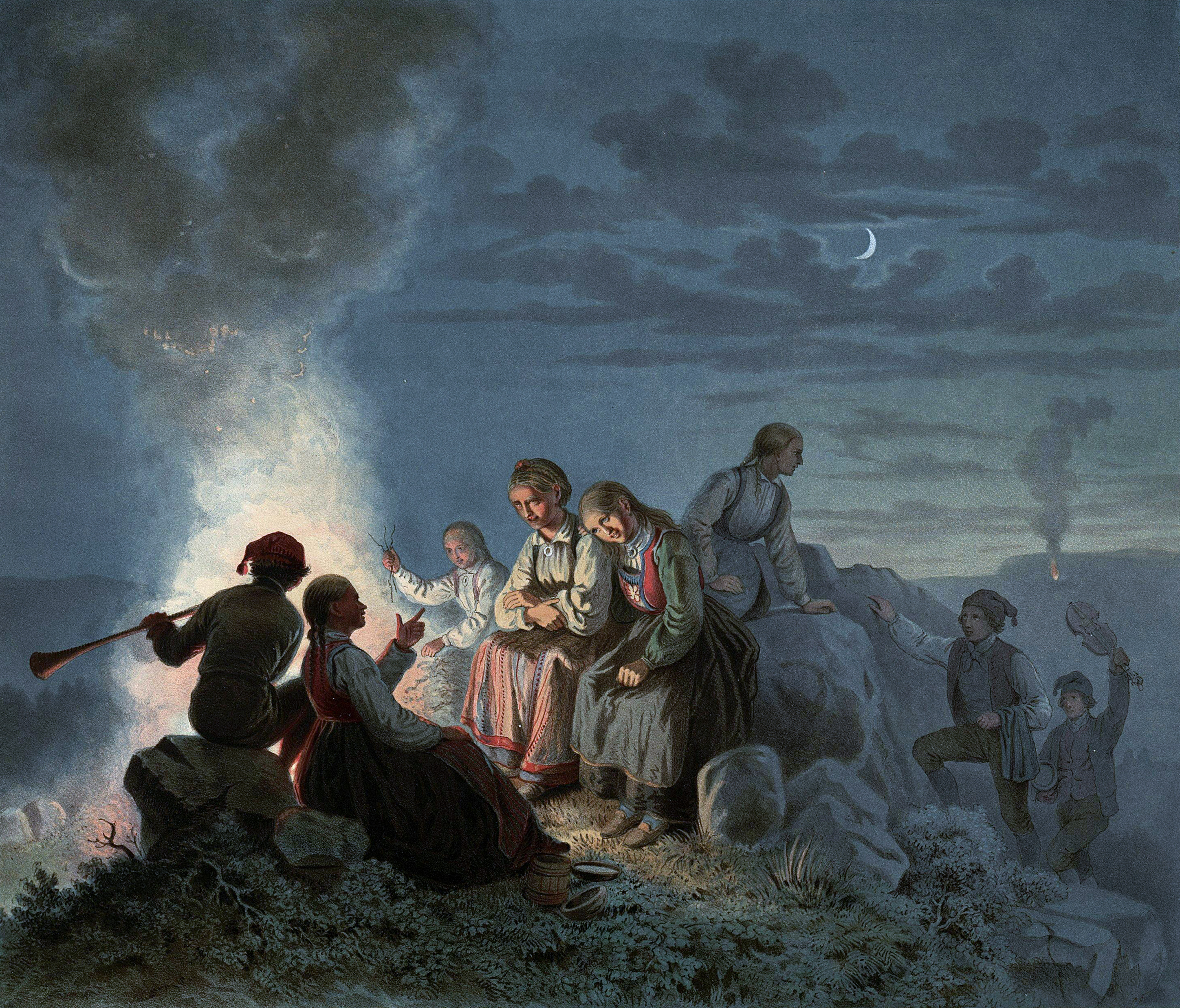 Litografi af Winckelmann & Sönner i Berlin